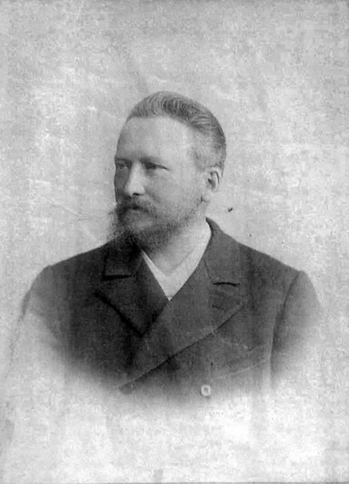 Фотография Авенариуса Петра Александровича основателя Приморской железной дороги в СПб и Курорта